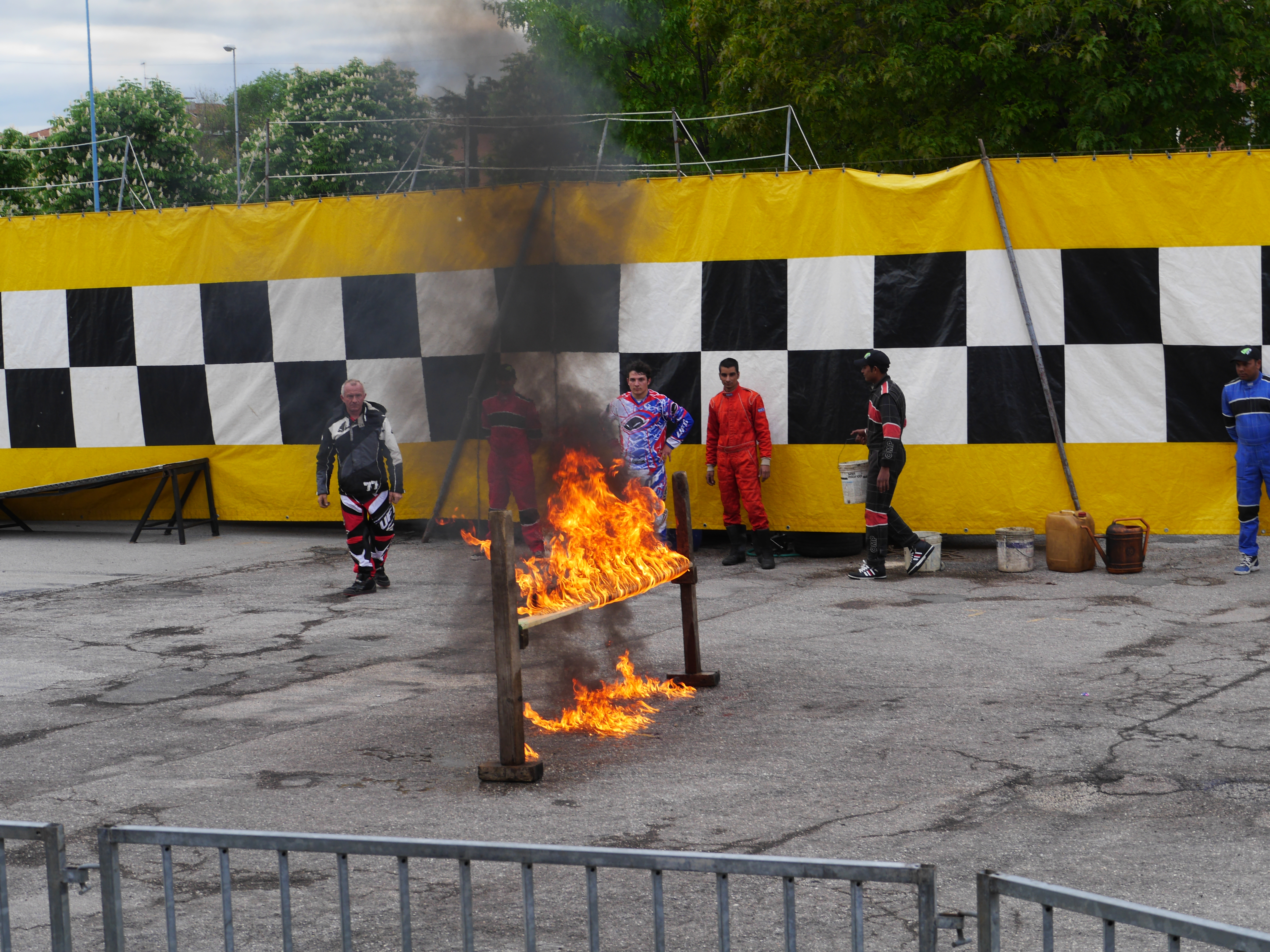 This photo was taken with Panasonic Lumix DMC-GH3 camera, thanks to Panasonic. You can see all photographs in category: Taken with Panasonic Lumix DMC-GH3.